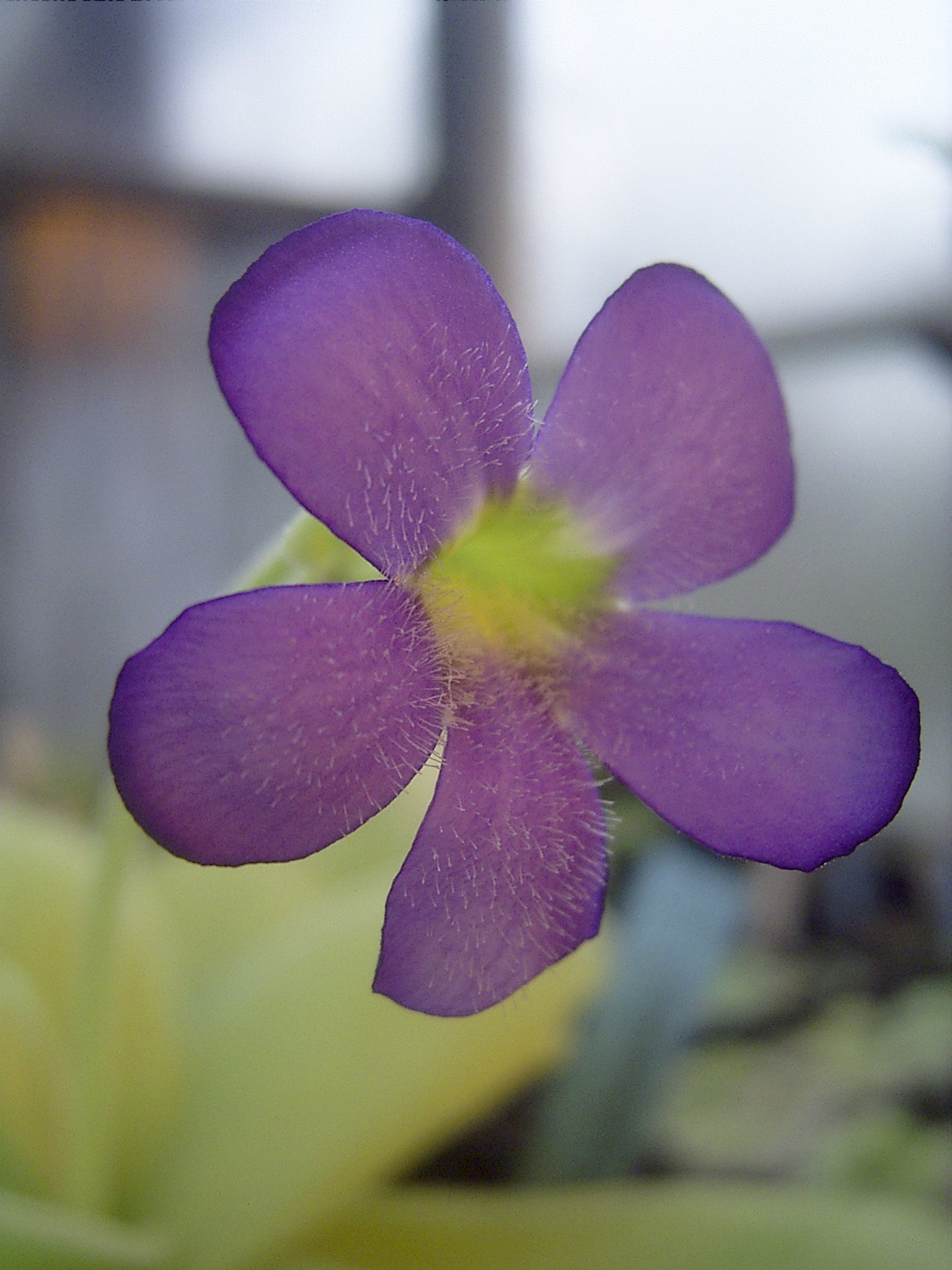 Flora Pinguicula gigantea